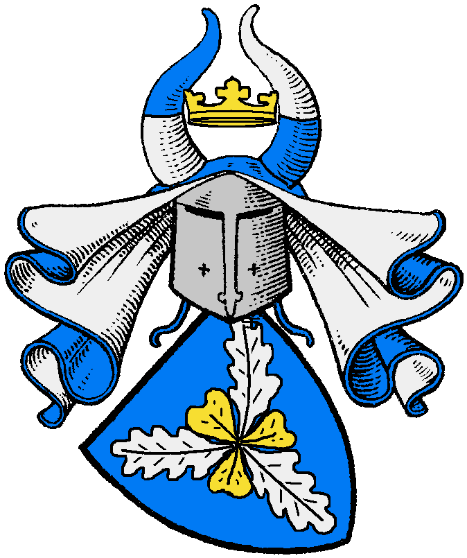 Stammwappen der altadligen von Bismarck